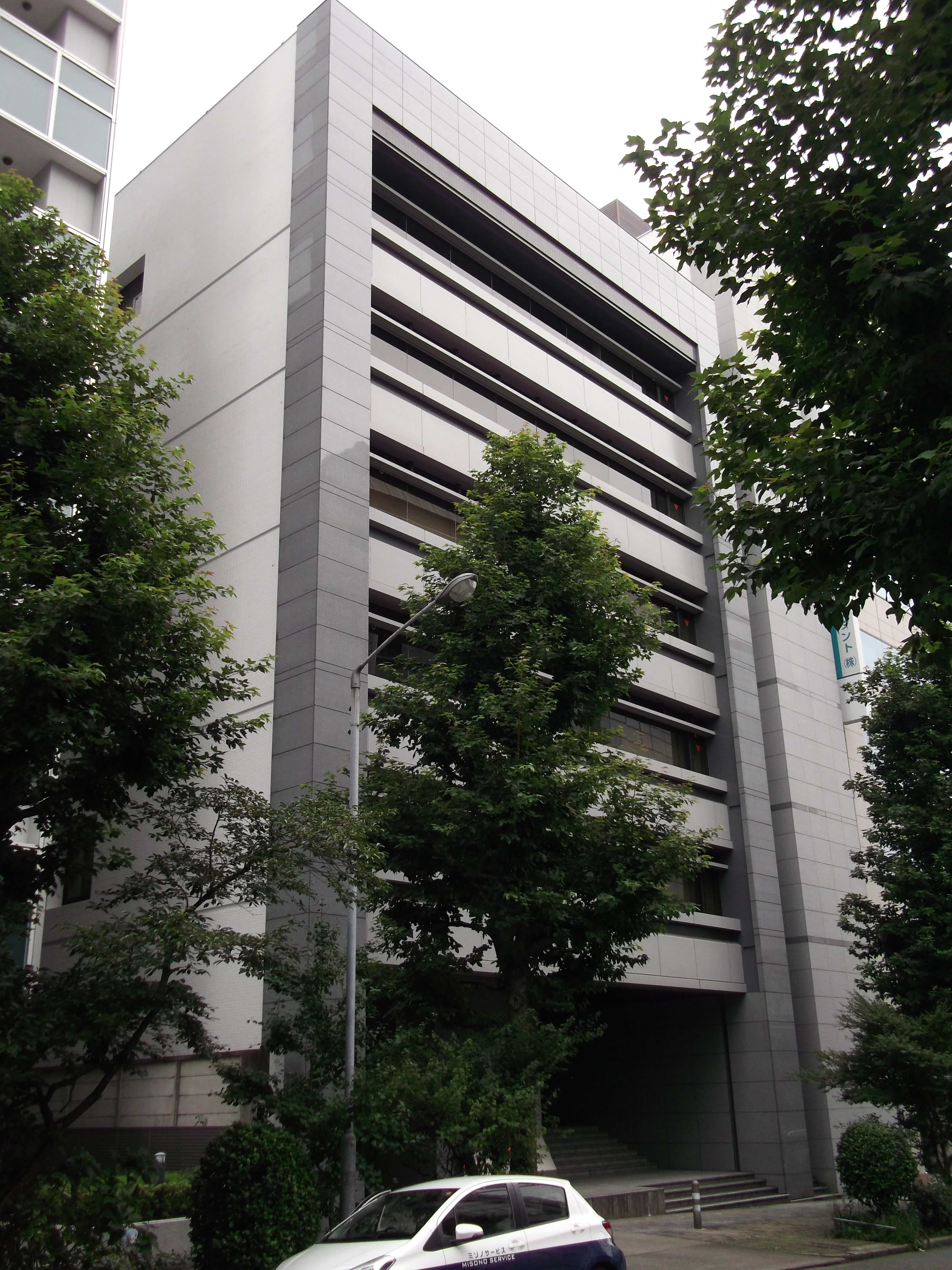 名古屋市中区の錦ファーストビルを北側公道東側より撮影